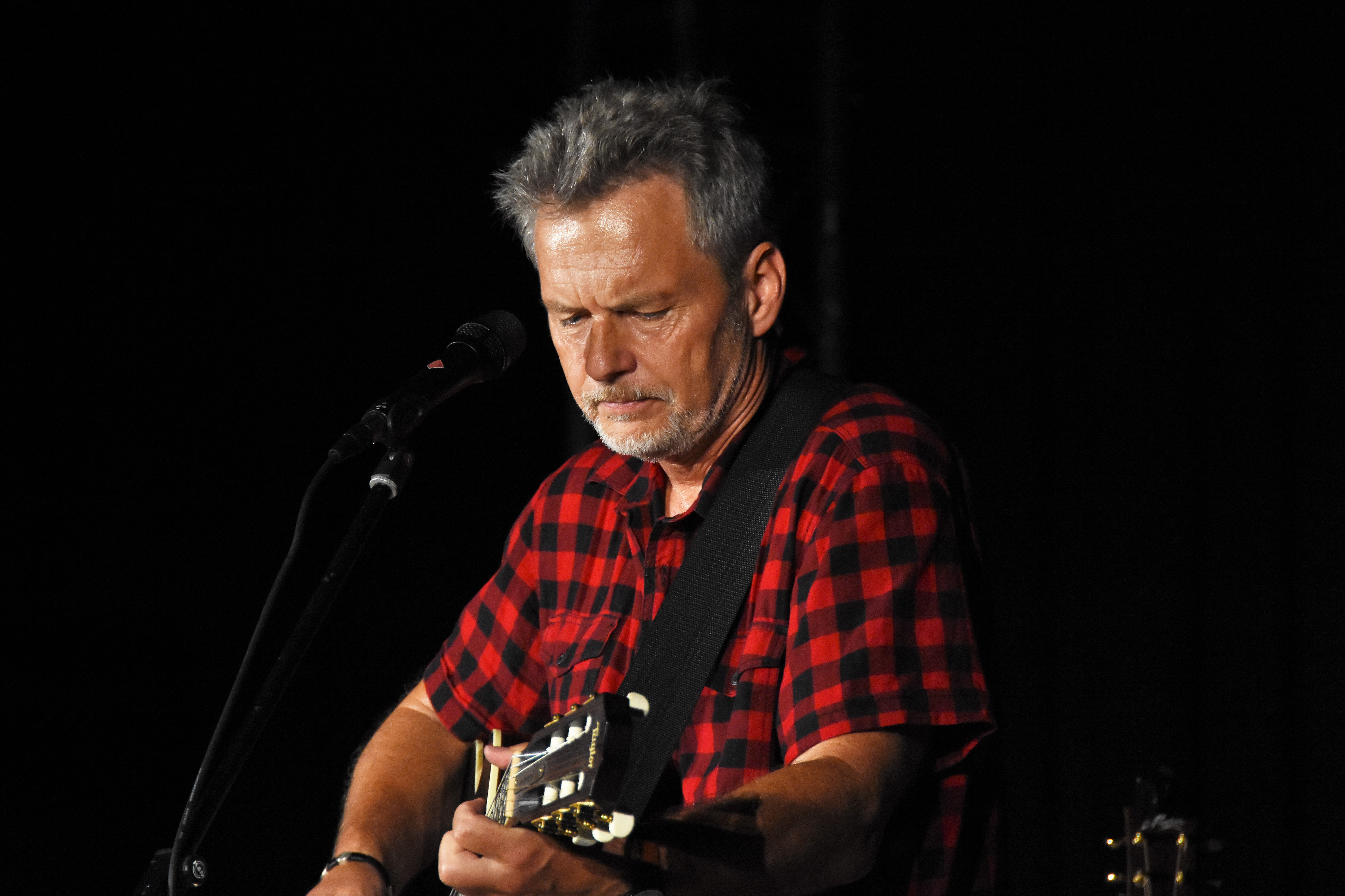 Paul Bartsch im Jahr 2018 zum Jubiläumskonzert "15 Jahre Bartsch & Band" in der Theatrale Halle